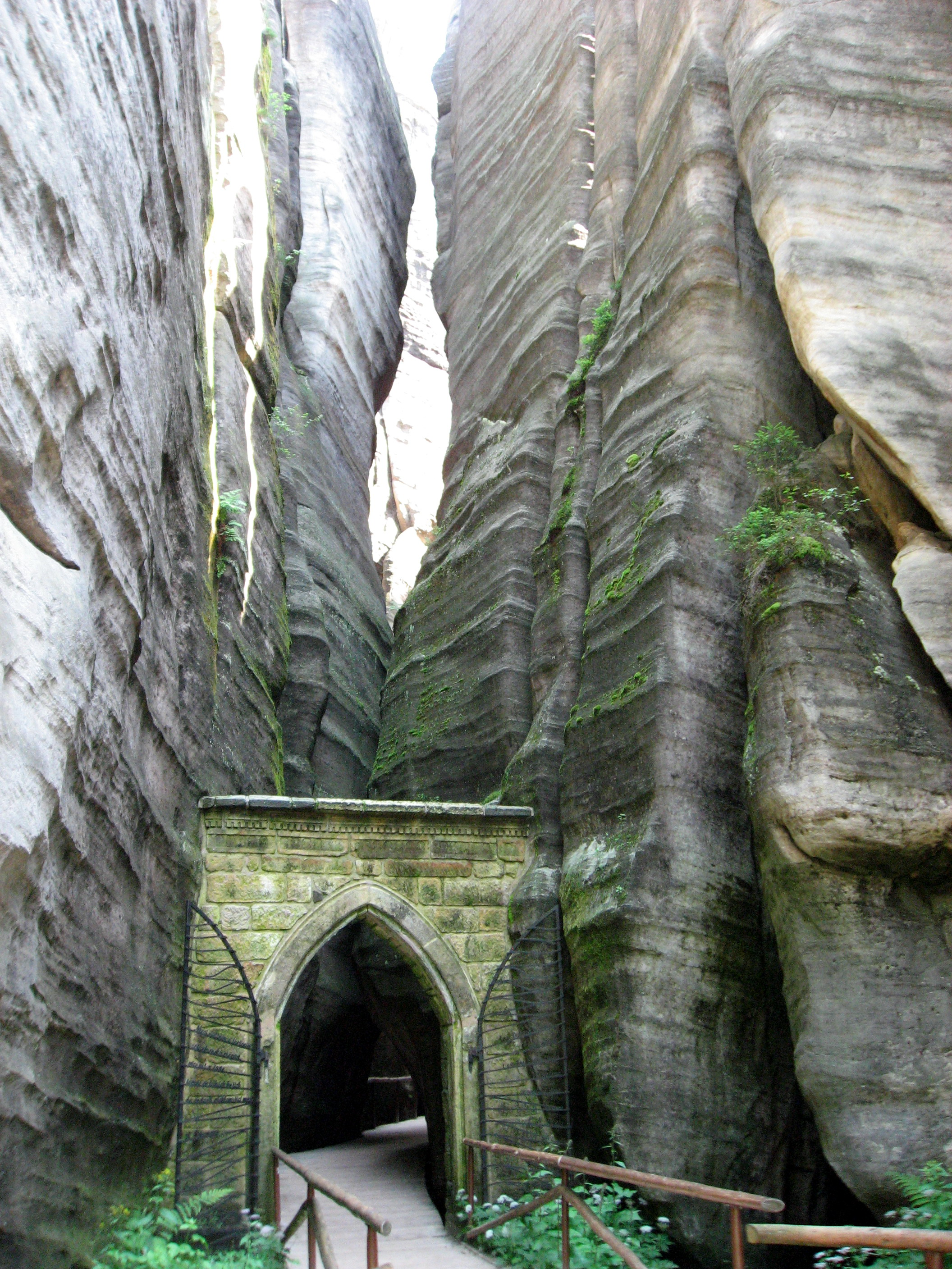 Adršpašskoteplické skály